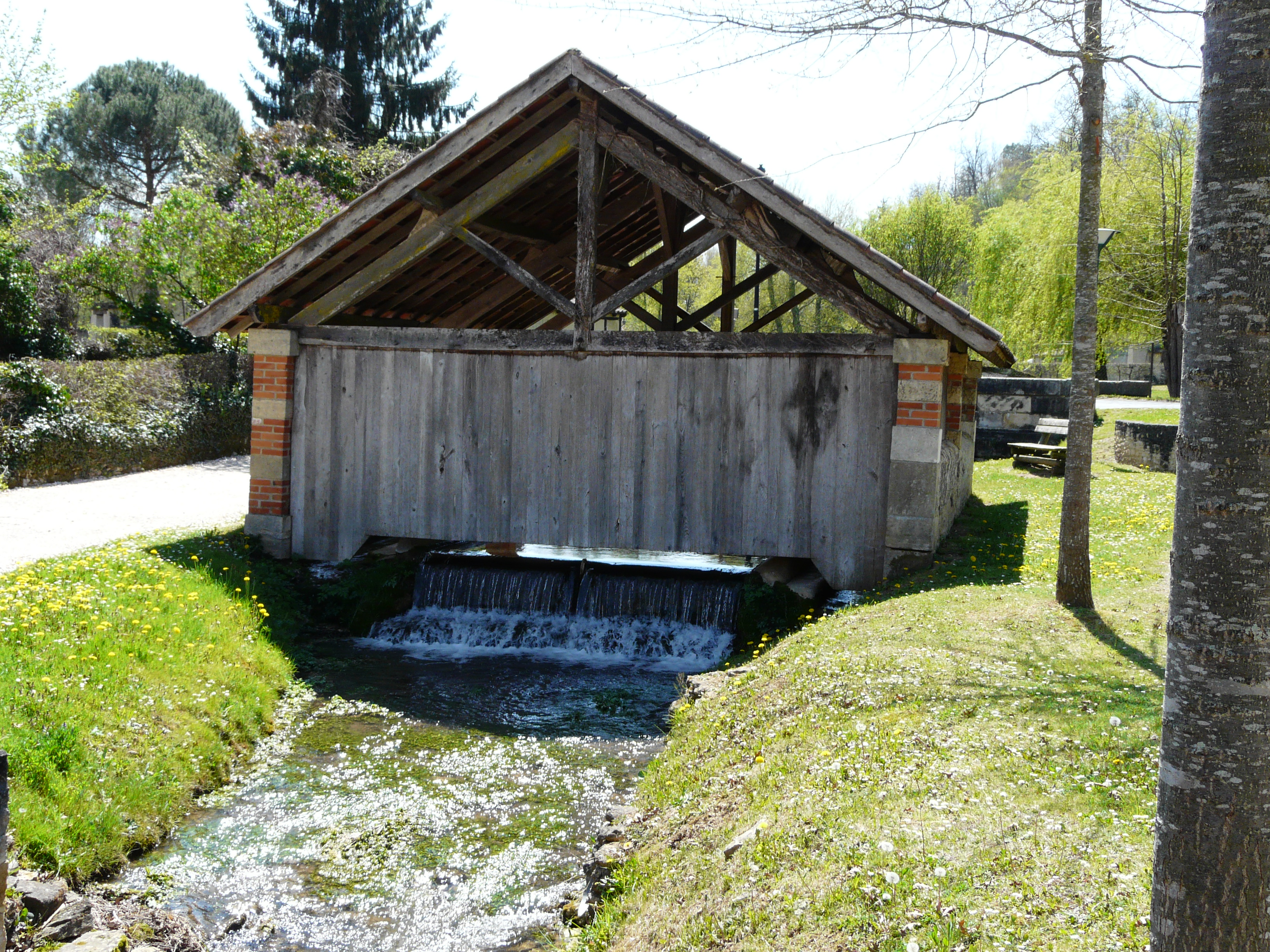 Lavoir sur la Chironde, Saint-Geniès, Dordogne, France. Vue prise depuis l'aval.